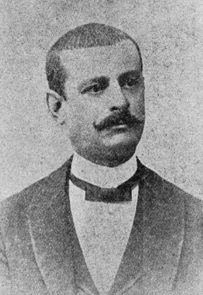 Director del Instituto Agrícola de Indígenas en 1895.